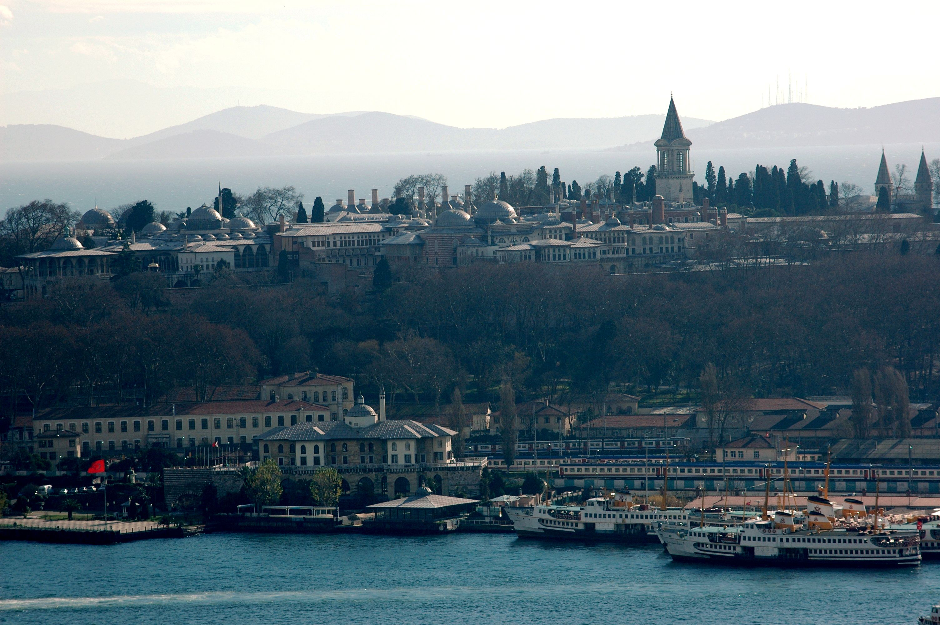 Palau de Topkapi des de torre de Gàlata